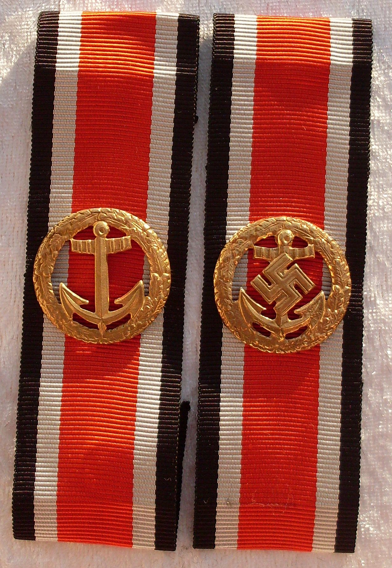 Ehrenblattspange der Kriegsmarine (links 57er Version, rechts stiftungsmäßige Ausführung)